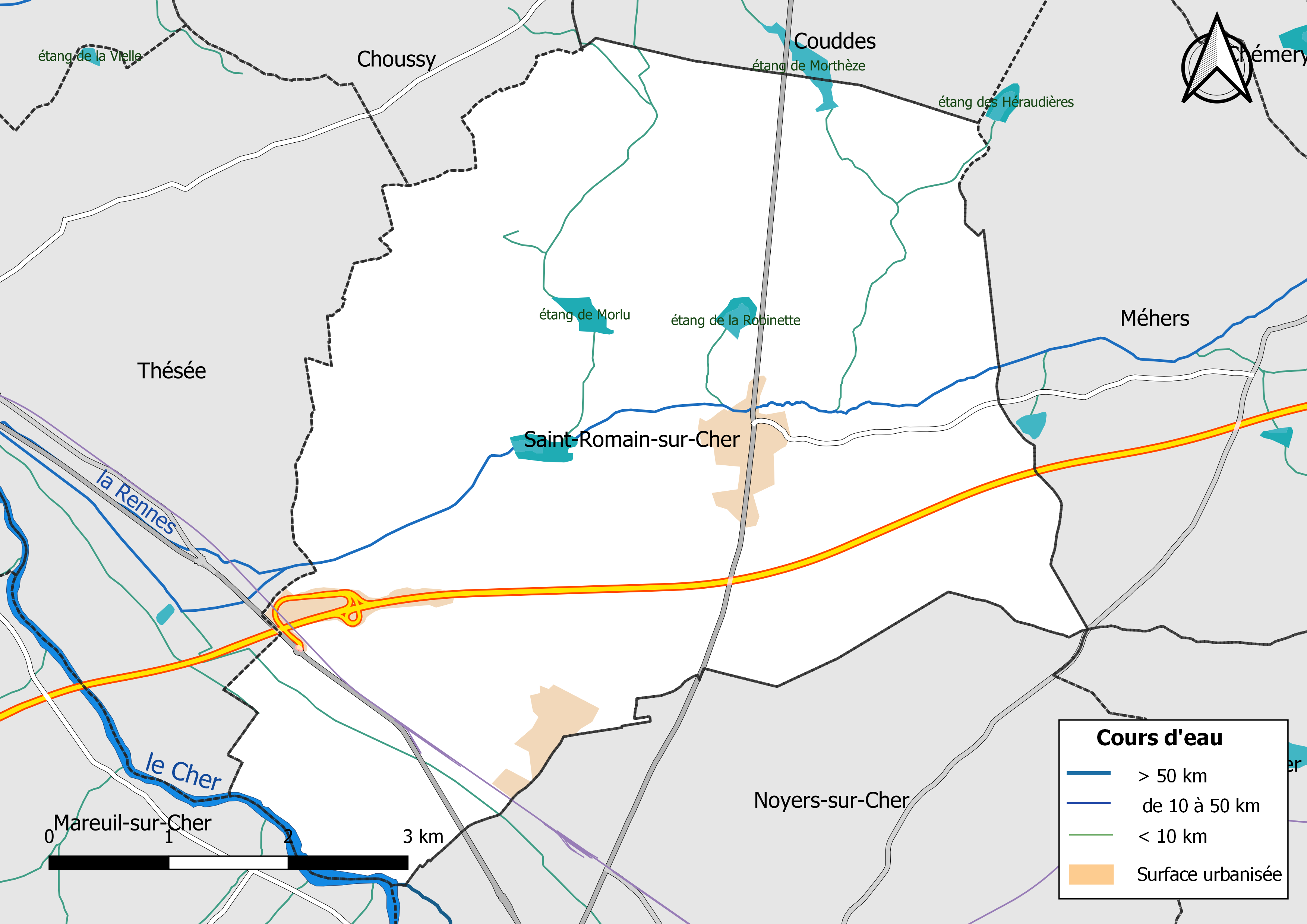 Carte du réseau hydrographique de la commune de Saint-Romain-sur-Cher (Loir-et-Cher, France).